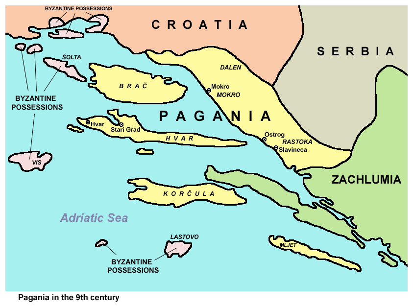 Historic map - Pagania in the 9th century. Povijesni zemljovid - Paganija u 9. stoljeću. Историјска карта - Паганија у 9. веку.